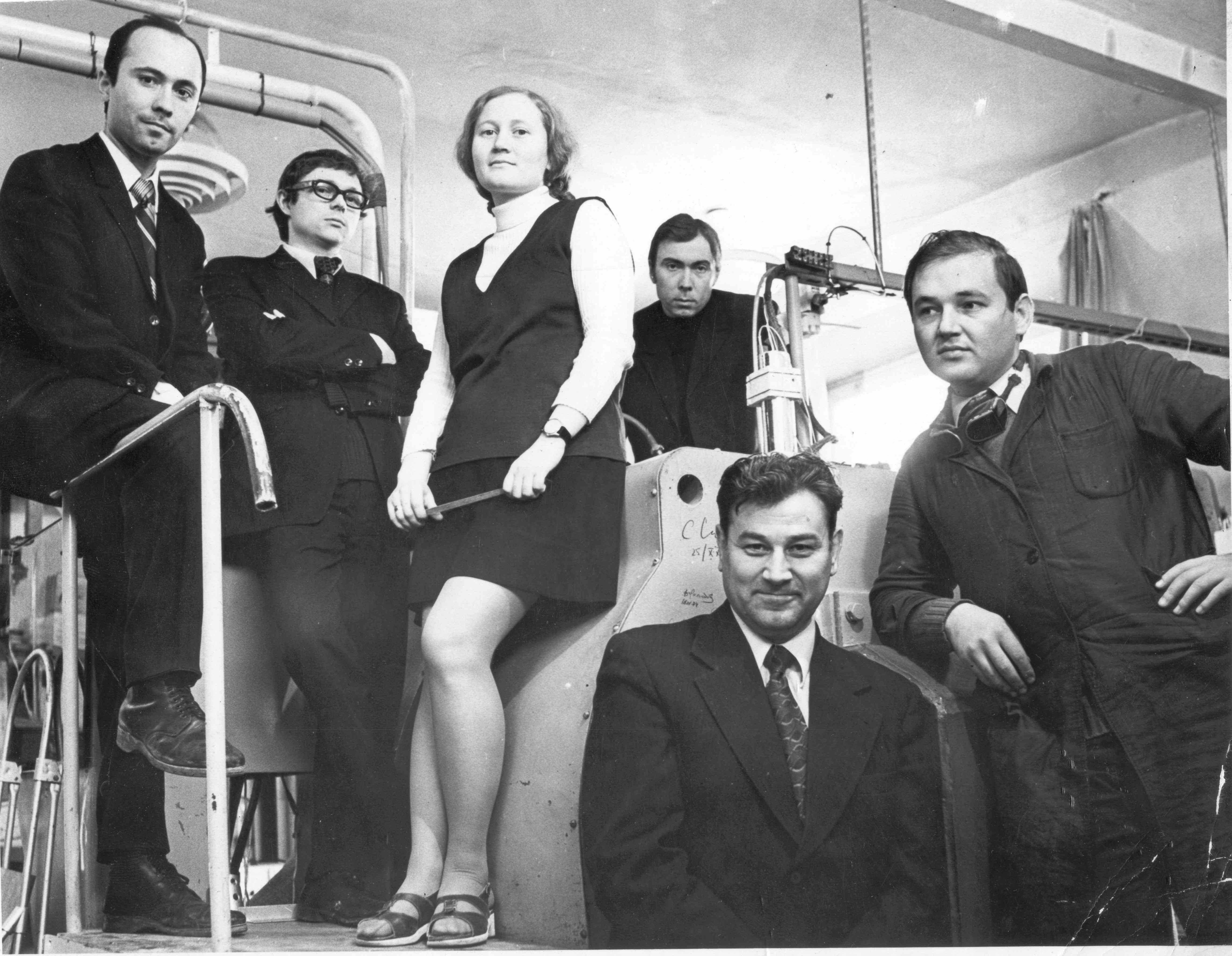 Работники лаборатории Узкозонных Полупроводников в 1970-1980 годы.